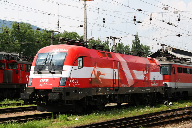 ÖBB Euro2008-Lok - ÖSTERREICH